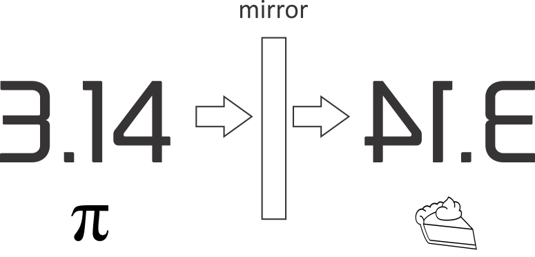 broj pi u ogledalu se vidi kao pie